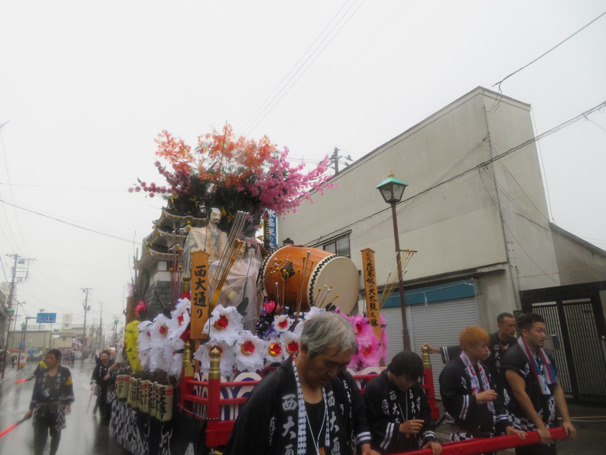 花巻の山車